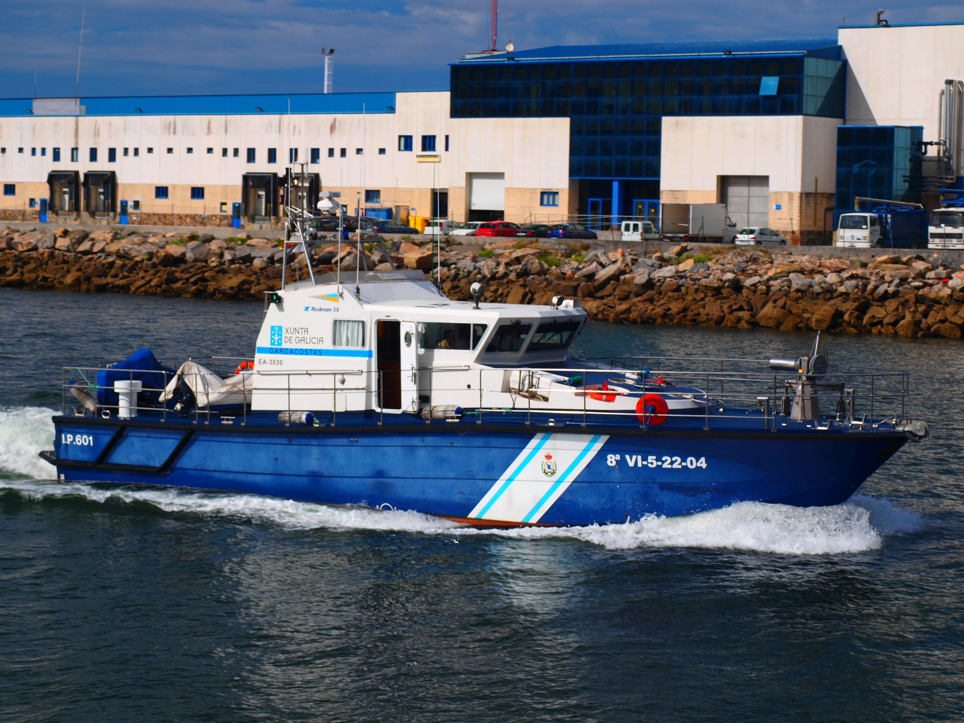 Rodman 58 de los Gardacostas de Galicia en Celeiro (Viveiro). Foto tomada con Olympus E-450+ Zuiko 14-42.